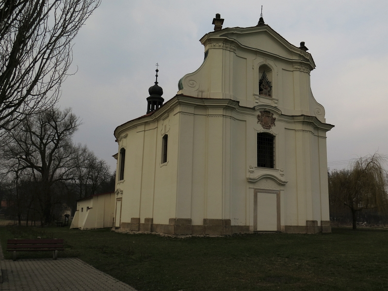 Kostel P. Marie (Křešice), Křešice.